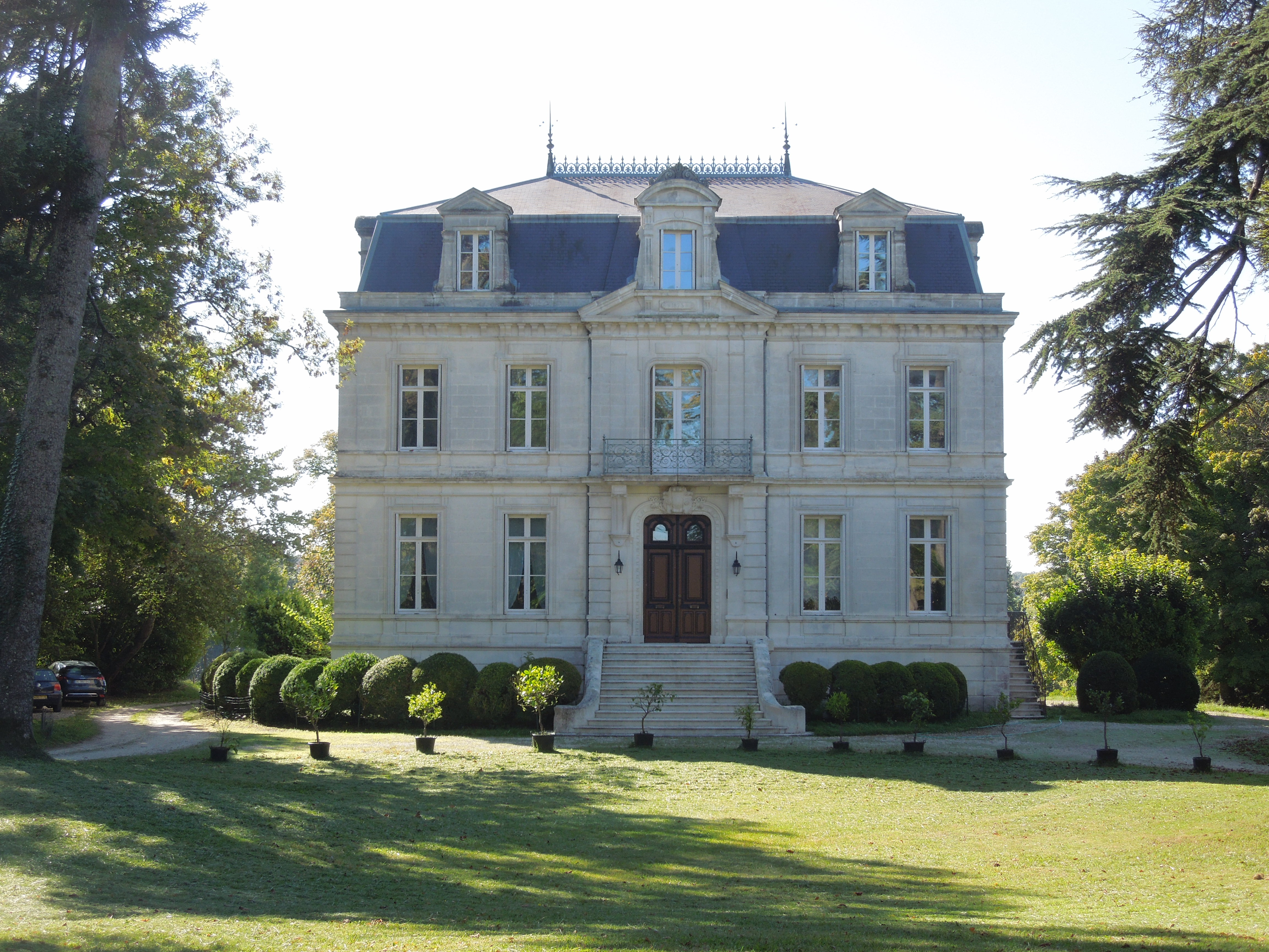 Das Château Monchoisi, aus der zweiten Hälfte des 19. Jahrhunderts, in Lignières, Ansicht von der Straße D 699